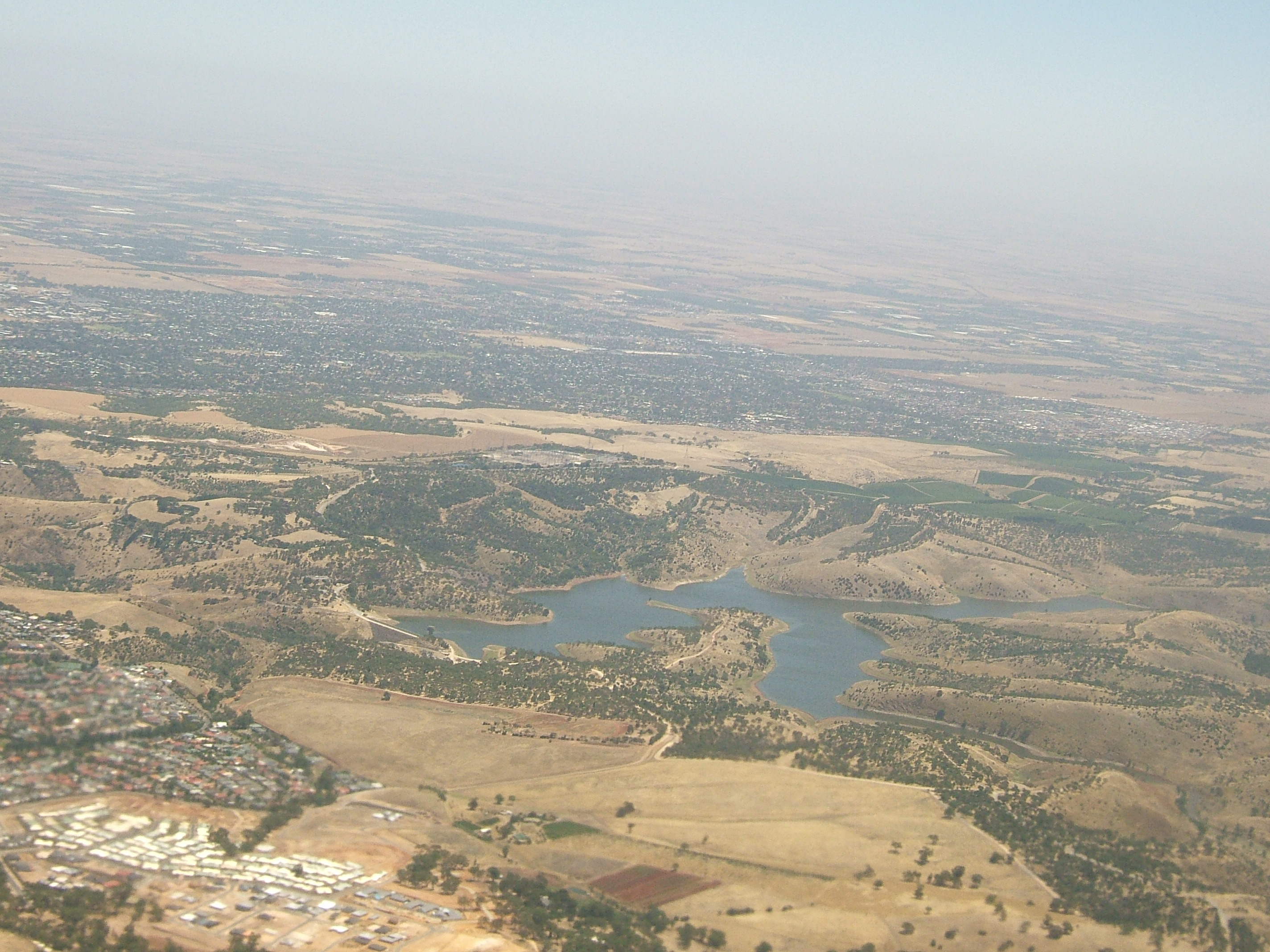 Little Para Reservoir, Adelaide